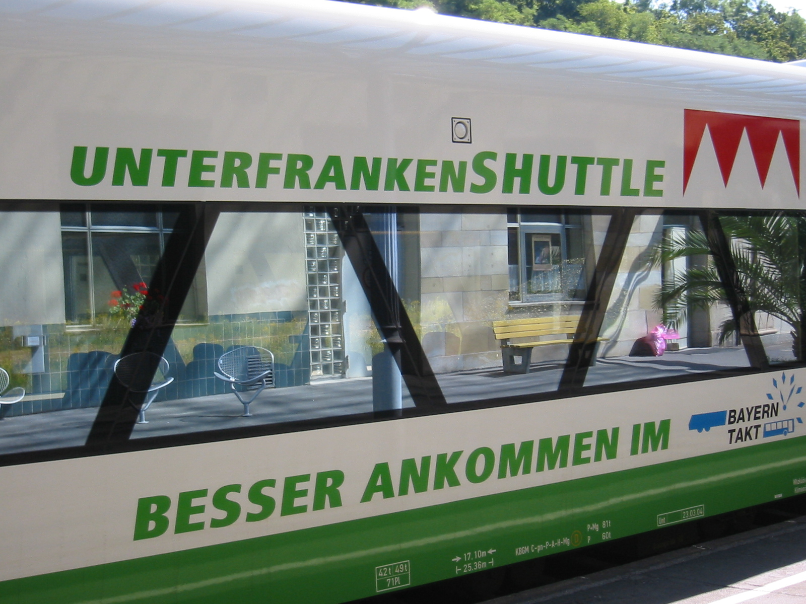 UnterfrankenShuttle der Erfurter Bahn (EIB) in Bad Kissingen. Neben den RegioShuttles der SüdThüringenBahn (STB) sind die UnterfrankenShuttles die zweite Regionale "Marke" der ErfurterBahn.